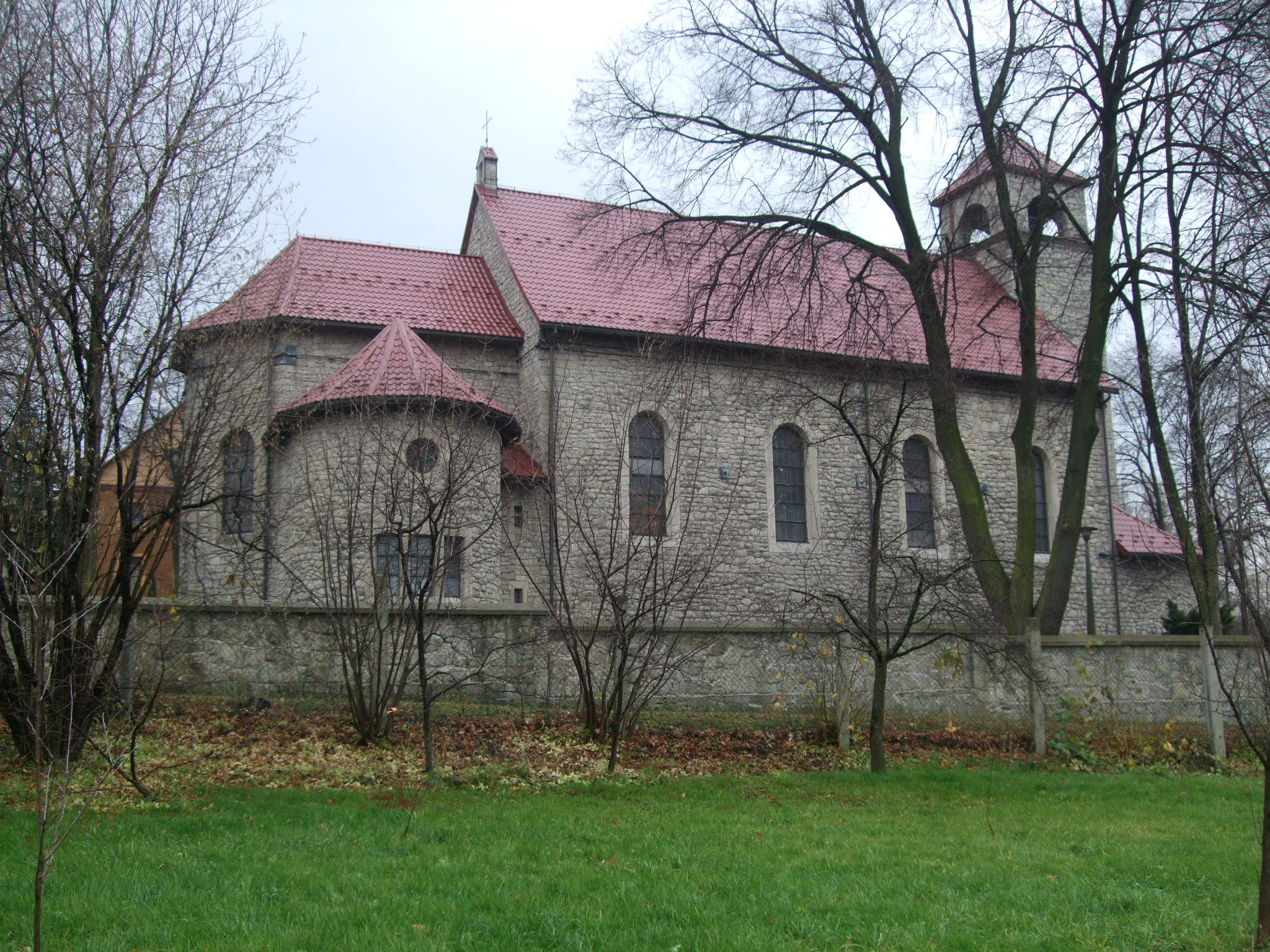 Kościół parafialny pod wezwaniem "Najświętszego Serca Pana Jezusa" zaprojektowany przez krakowskiego architekta prof.Józefa Gałęzowskiego.